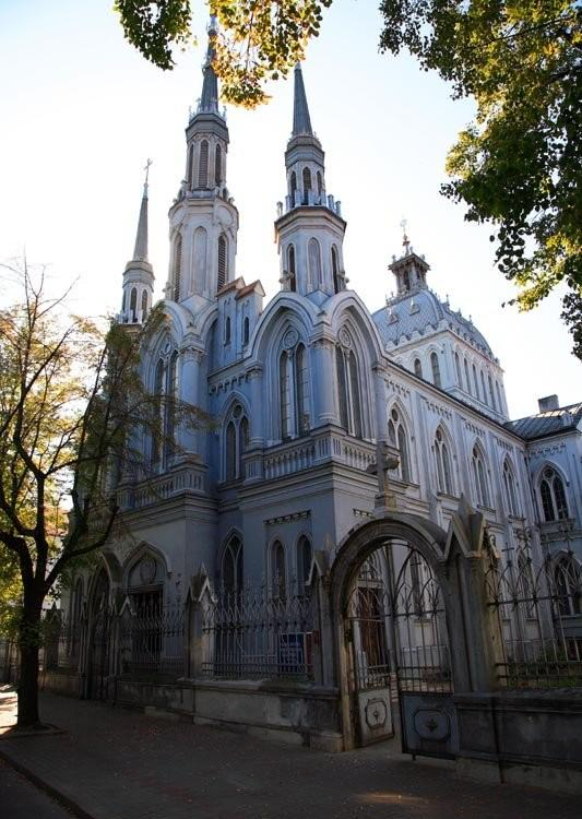 Polska